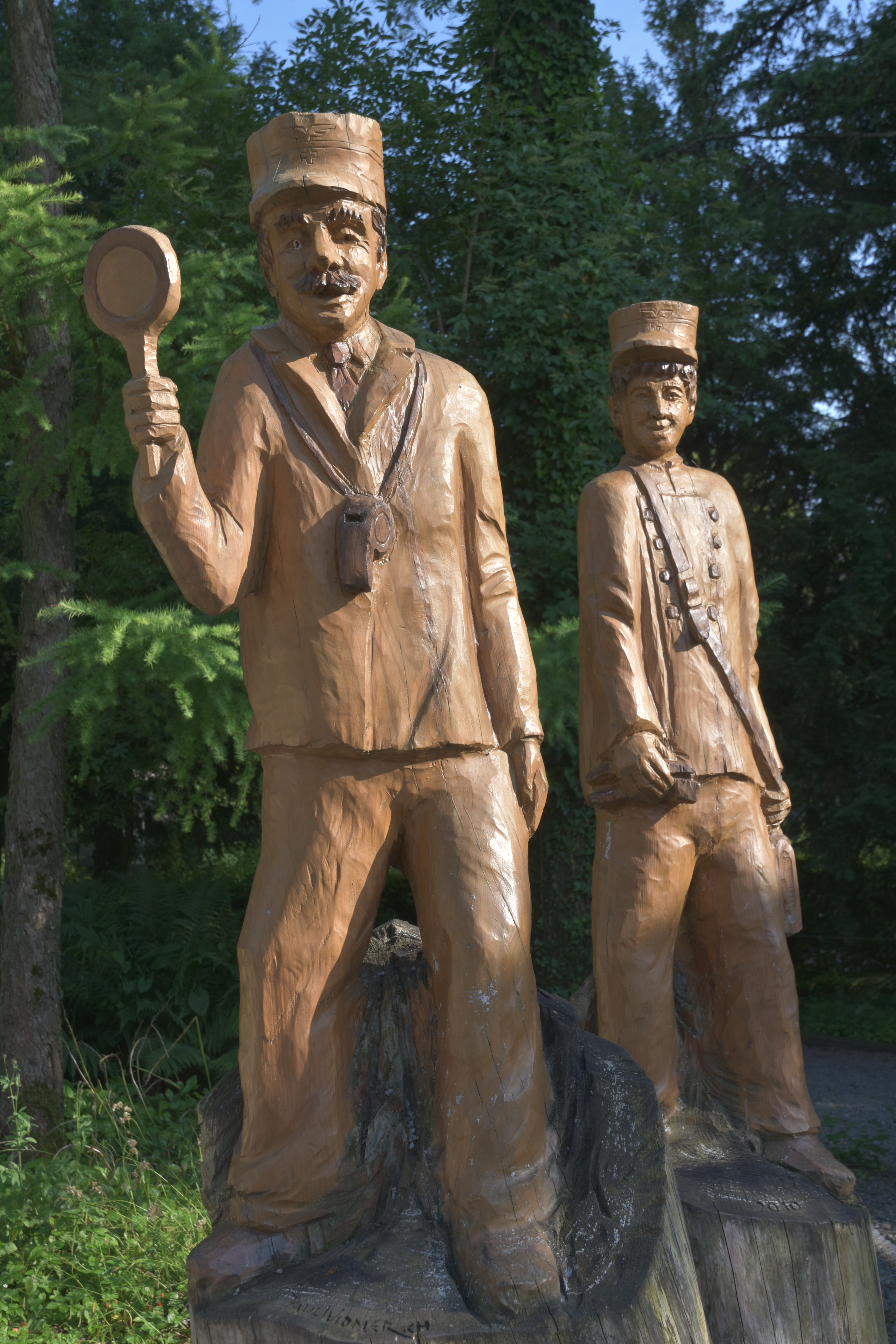 Adele & Gottlieb Duttweiler's' Park im Grüene in Rüschlikon (Switzerland)